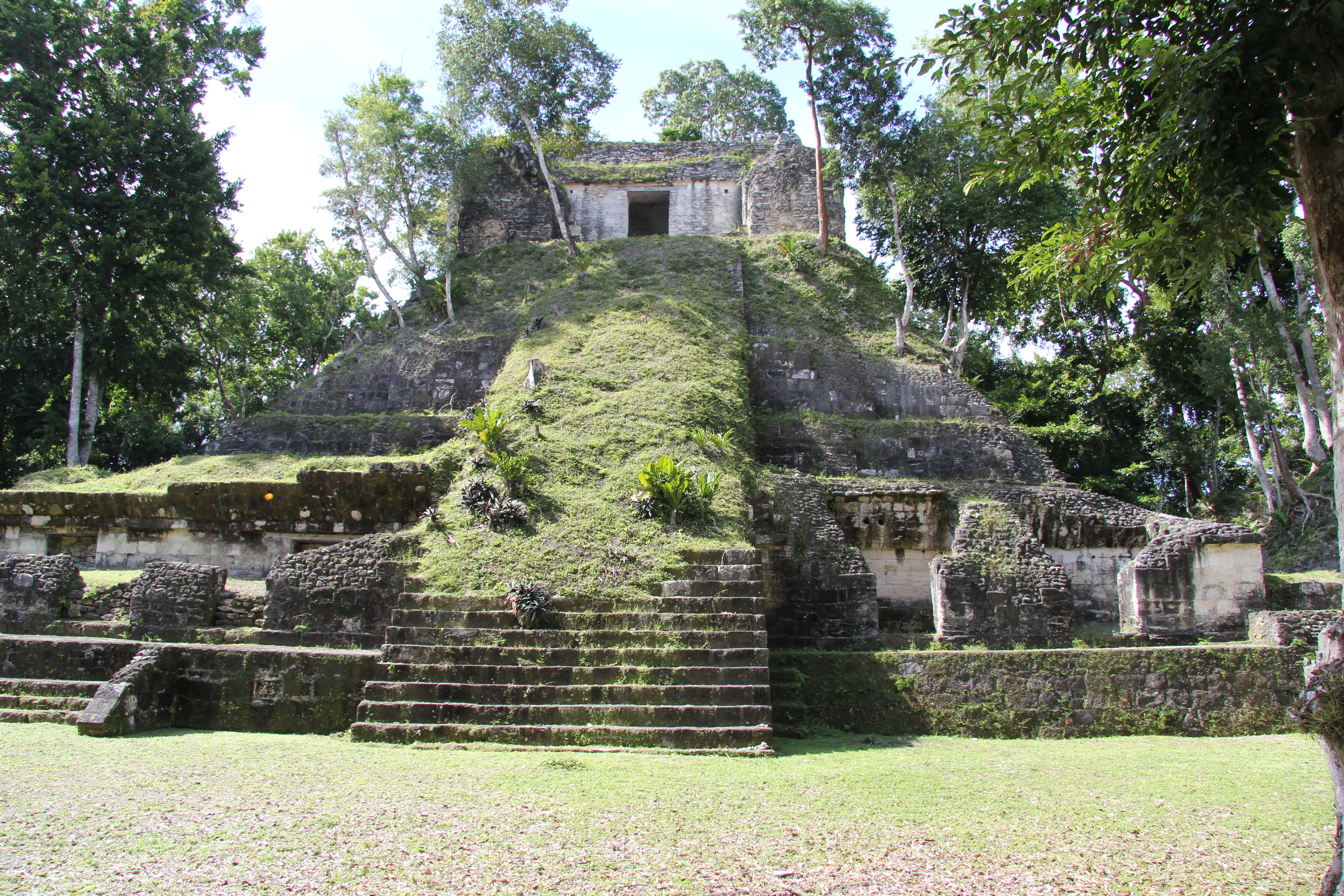 Ruinas mayas del parque Yaxhá Nakum Naranjo, Reserva de la Biosfera Maya, Petén, Guatemala